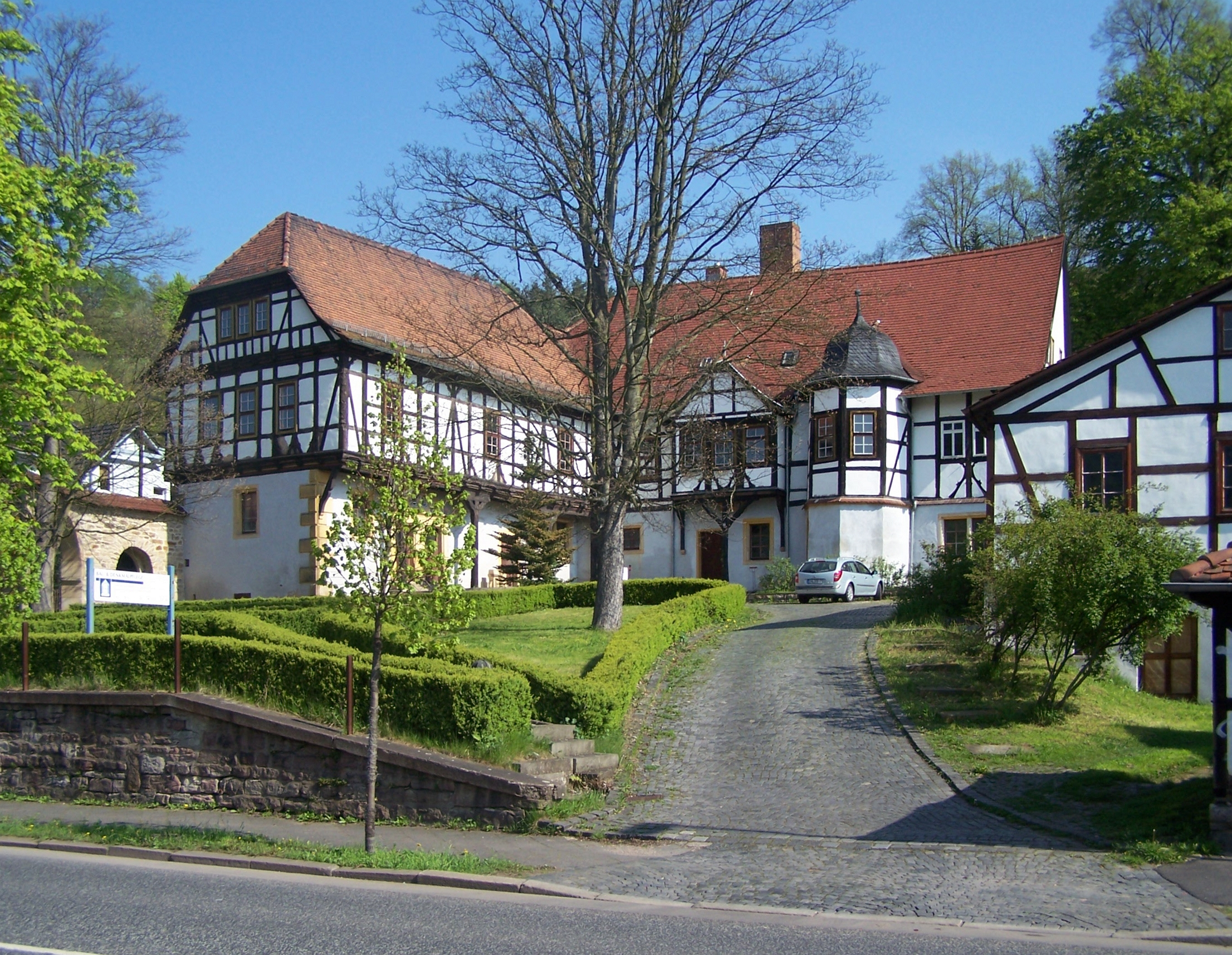 Eisenach, Gothaer Straße, Fischbacher Schlößchen